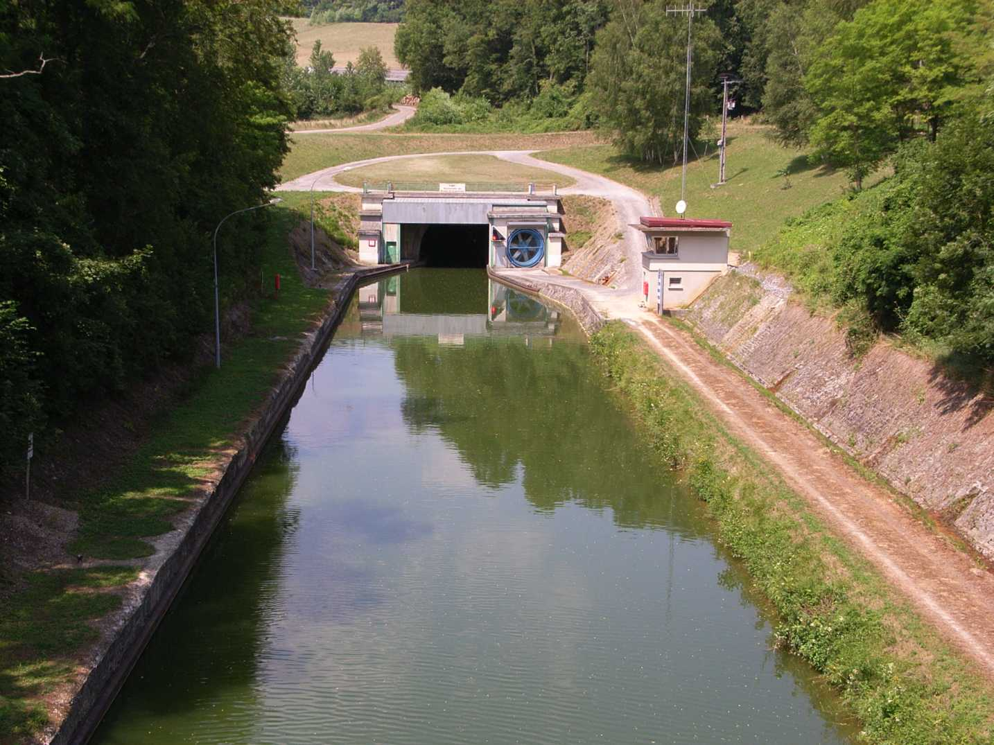 Canal de l'Oise à l'Aisne, au passage du chemin des Dames.